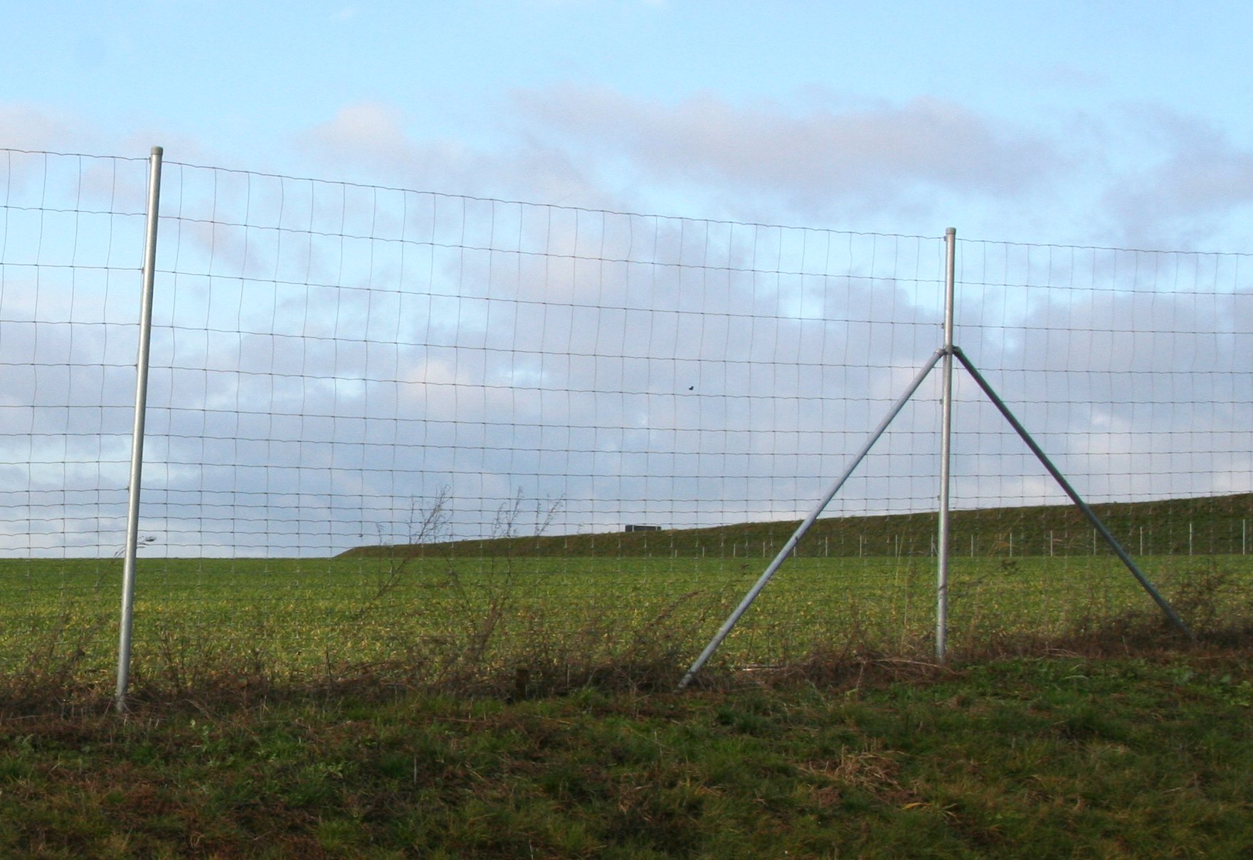 Wildzaun, Wildschutzzaun an der Autobahn A72